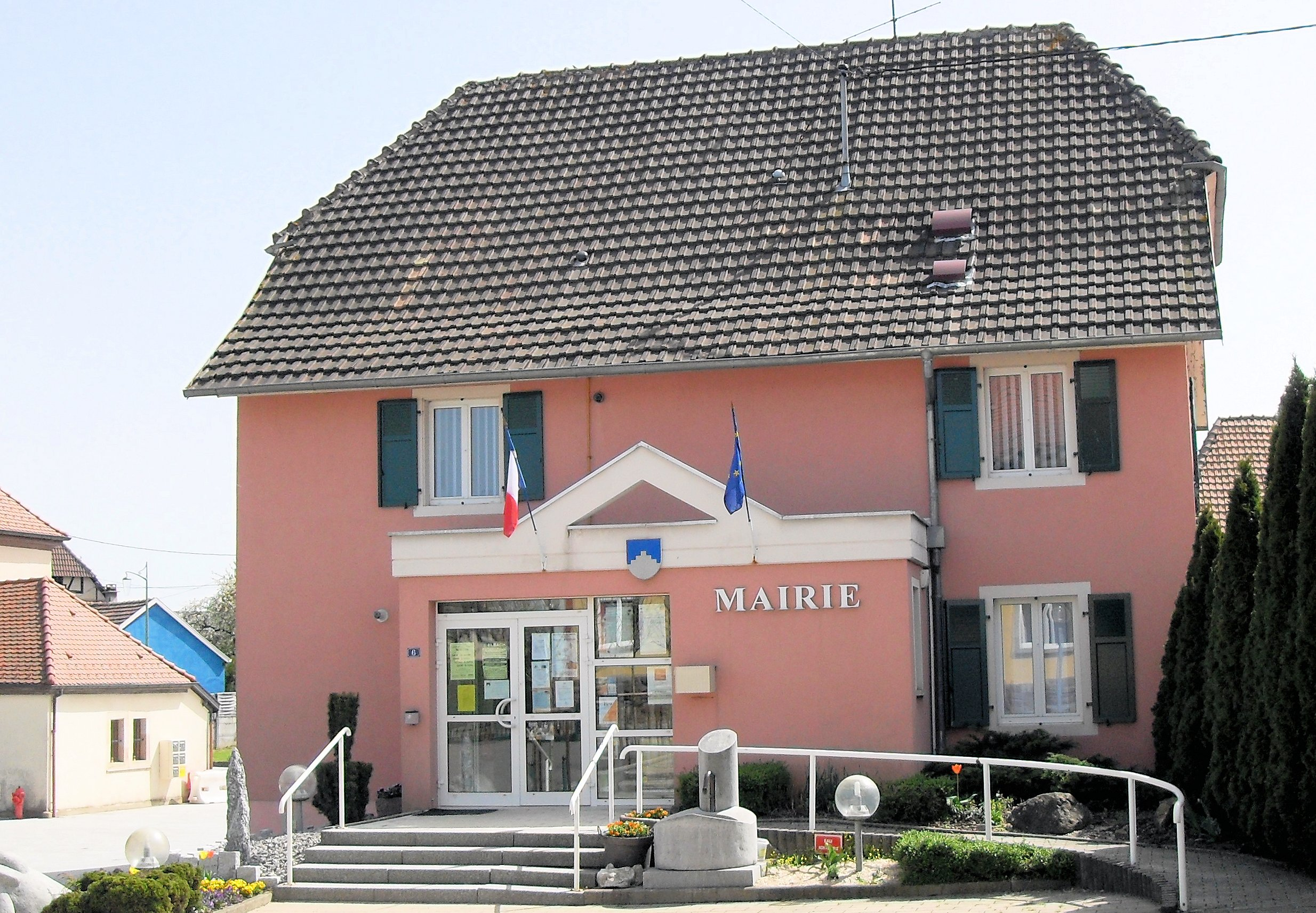 La mairie de Retzwiller